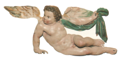 Antxietaren taila